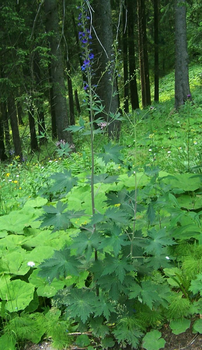 Delphinium elatum (pl. ostróżka wyniosła), habitat: Tatra Mountains, Dolina Strążyska